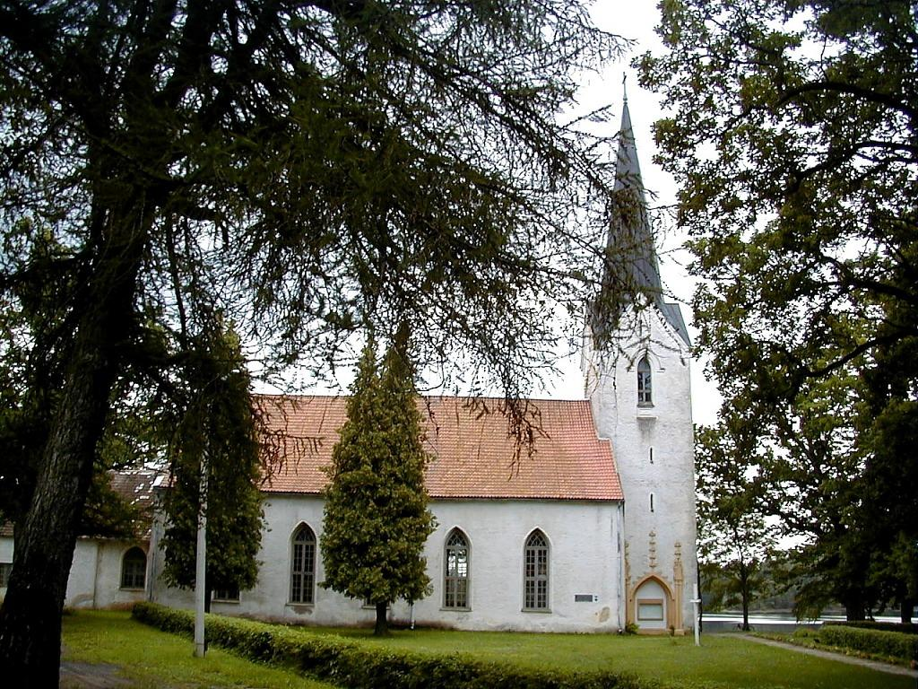 Kokneses luterāņu baznīca 2000-07-23